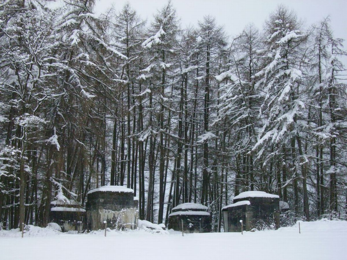 Fundamente der von Dr. Ley geplanten Windmühle nördlich des Gutes